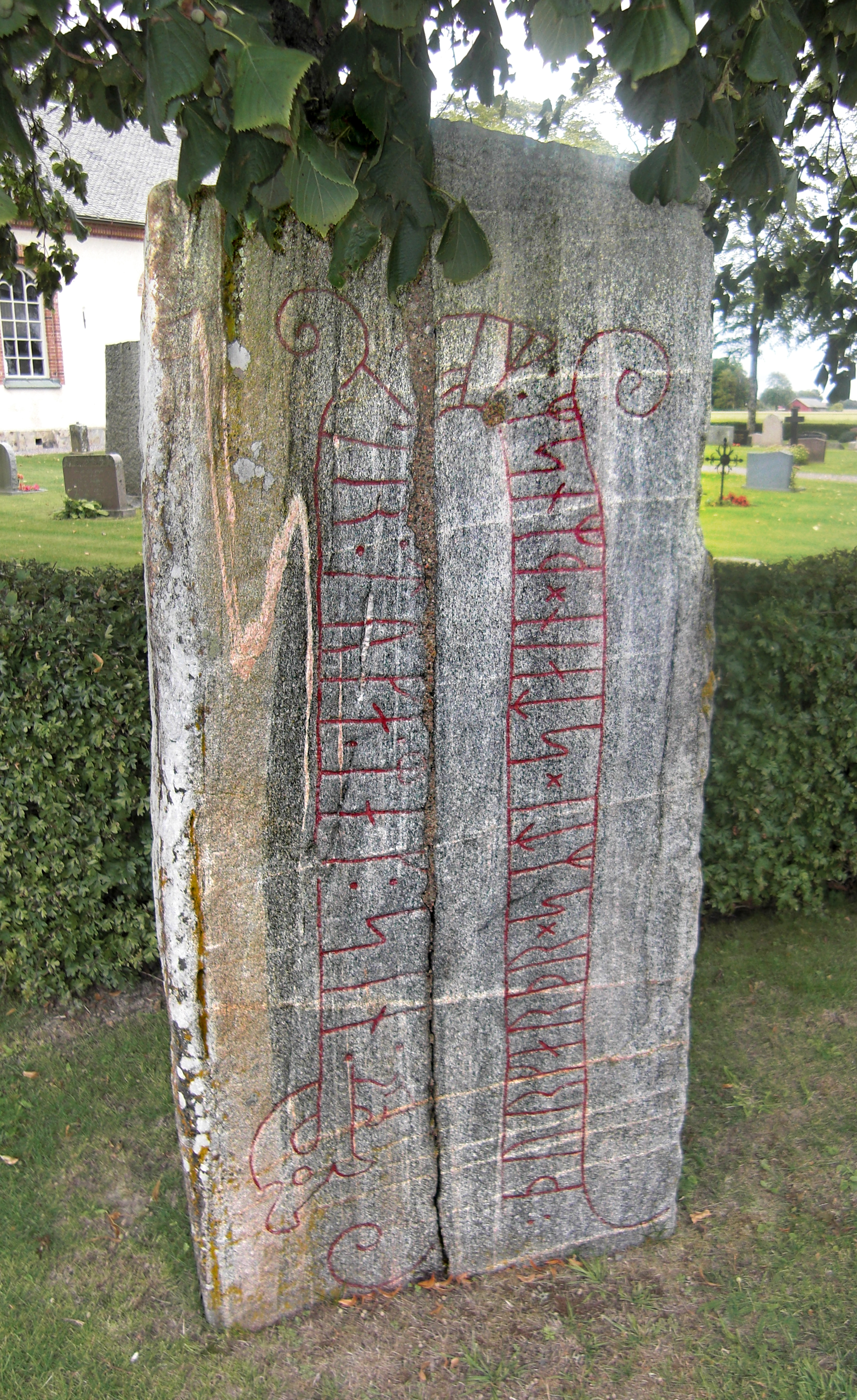 Salstenen Vg 104 (Raä-nr Sal 1:1) vid Sals kyrka i Åse härad, Grästorps kommun, f.d. Skaraborgs län, Skara stift, Västergötland, Västra Götalands län, Sverige.